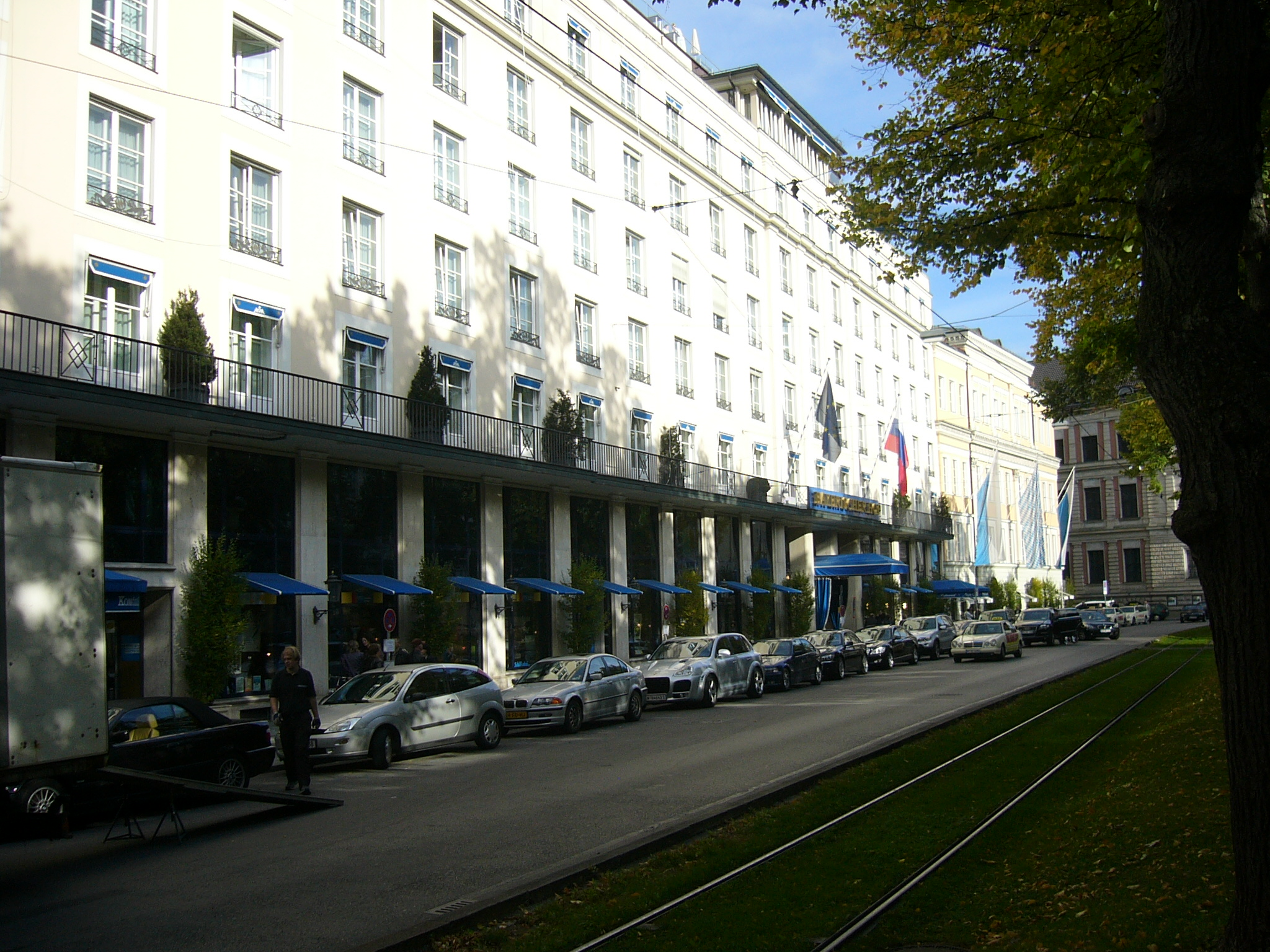 Hotel Bayerischer Hof München - Außenansicht der Südseite mit Blick nach Osten